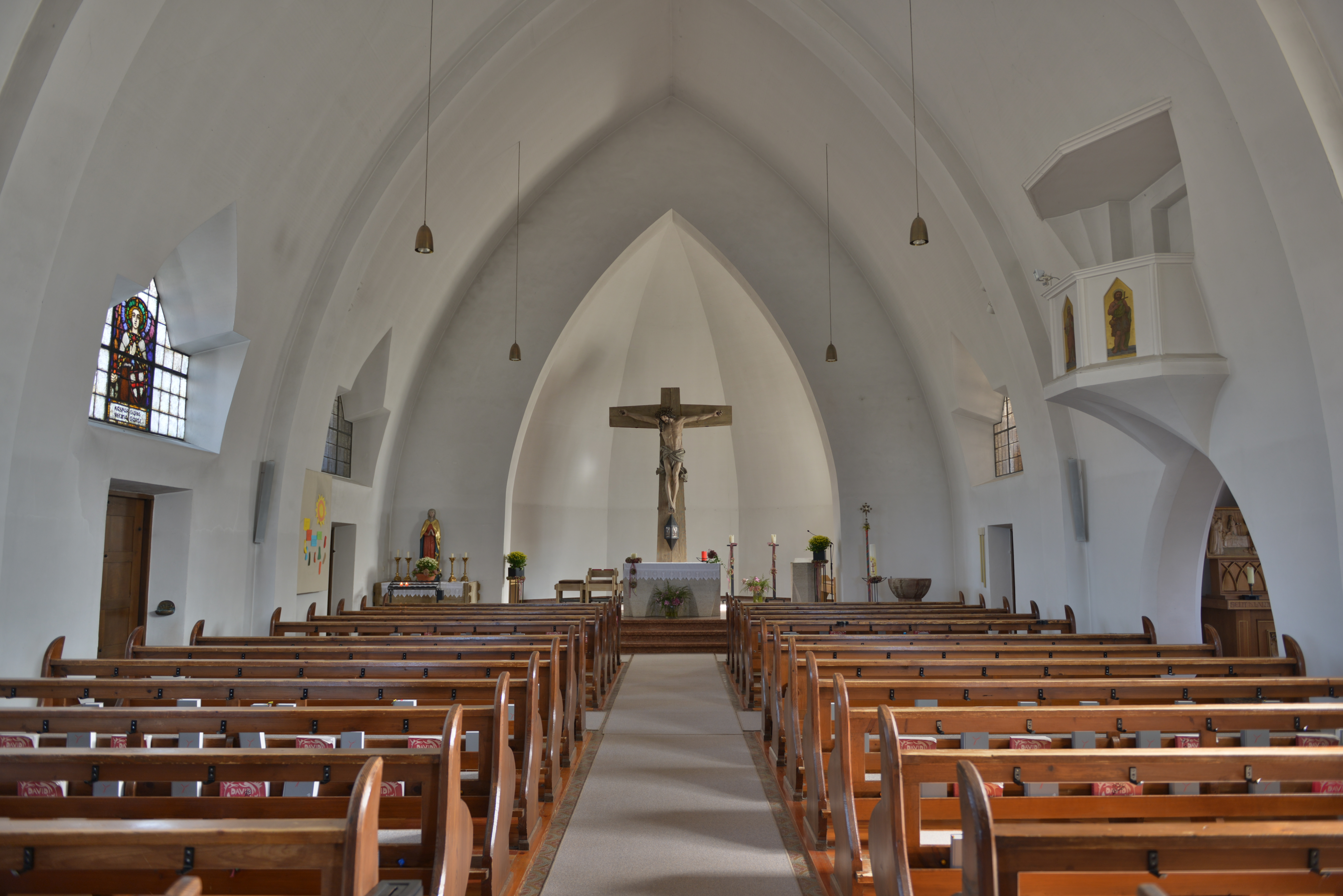 Pfarrkirche zum "Hl. Johannes dem Täufer" in Zwischenwasser - Batschuns erbaut 1921-23 nach Plänen von Clemens Holzmeister.